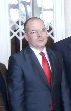 Мамыкин Андрей Владимирович — латвийский журналист и политик